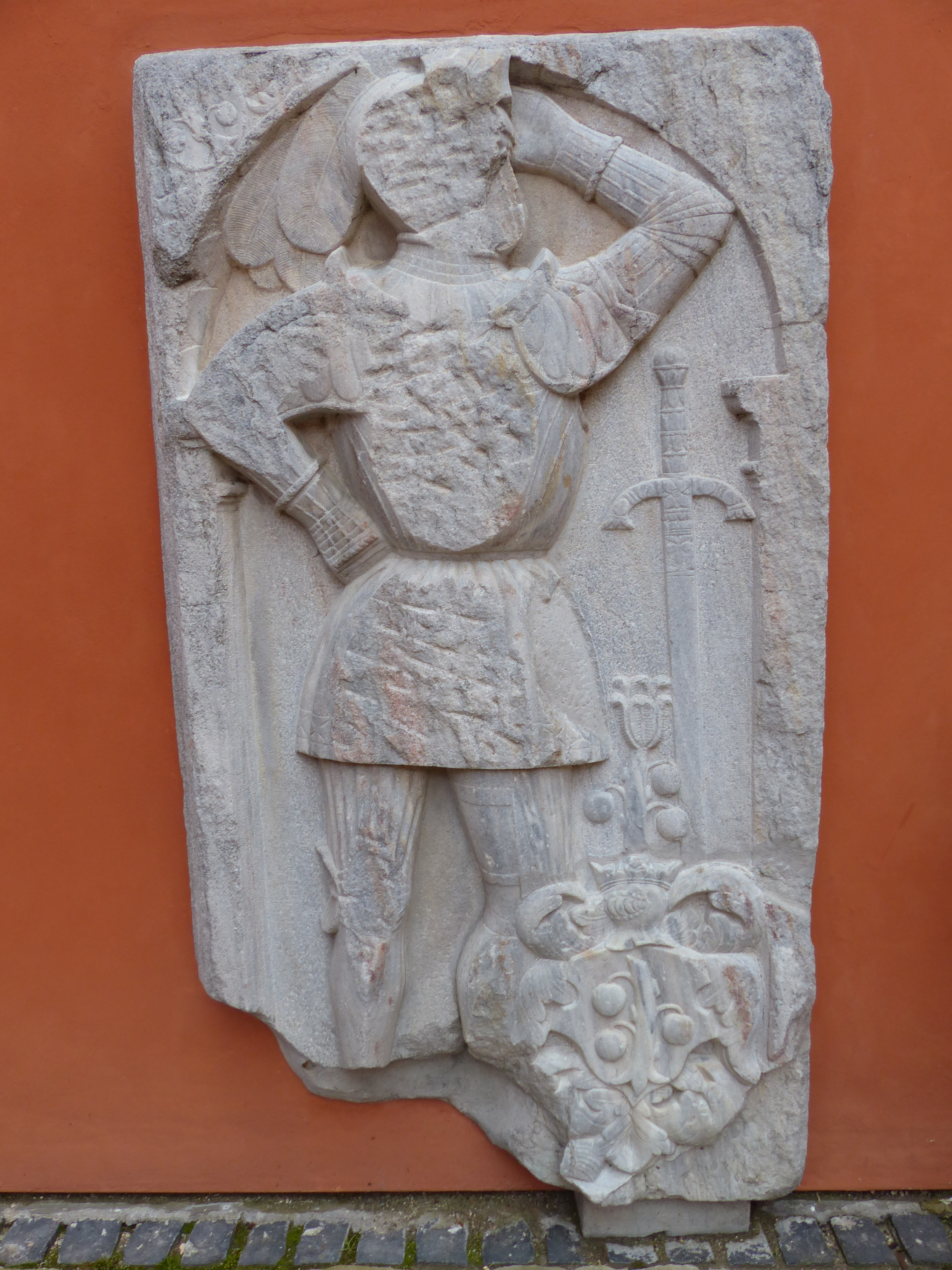 Schloss in Klösterle an der Eger